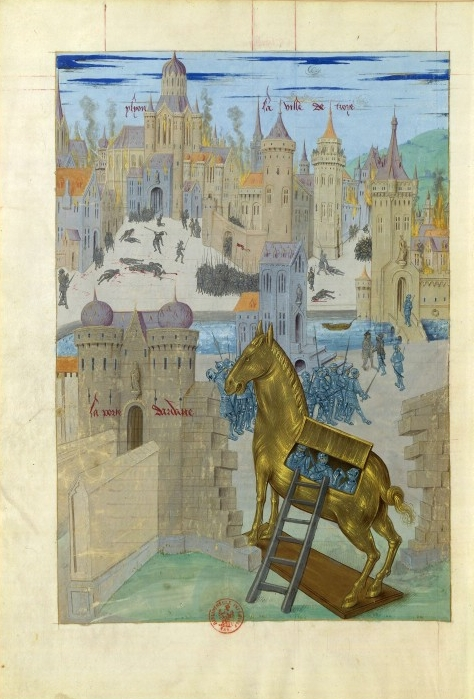 Cheval de Troie : prise de Troie département Manuscrits occidentaux cote du document FRANCAIS 22552 période du document Moyen âge date du document ou du recueil 1495 partie de Le Recueil des histoires de Troyes folio, pagination Folio 277v auteur(s) Le Fèvre, Raoul (Auteur)